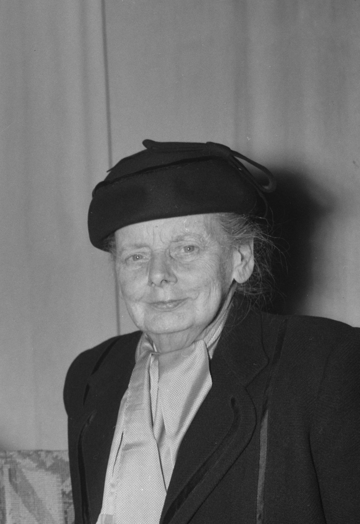 Collectie / Archief : Fotocollectie Anefo Reportage / Serie : [ onbekend ] Beschrijving : Receptie van Betsy Westendorp Osieck t.g.v. 80e verjaardag Datum : 29 december 1960 Trefwoorden : recepties, verjaardagen Persoonsnaam : Betsy Westendorp Osieck Fotograaf : Bilsen, Joop van / Anefo Auteursrechthebbende : Nationaal Archief Materiaalsoort : Negatief (zwart/wit) Nummer archiefinventaris : bekijk toegang 2.24.01.04 Bestanddeelnummer : 911-9206 Reacties Geplaatst door Maaike op 23 maart 2013 - 14:49. v.l.n.r. Jo Bauer-Stumpff; Betsy Westendorp-Osieck; Jacoba Surie. Zij maakten deel uit van de Amsterdamse Joffers Locatie: Amstel Hotel Plaats: Amsterdam; Noord-Holland Trefwoorden: kunstenaars